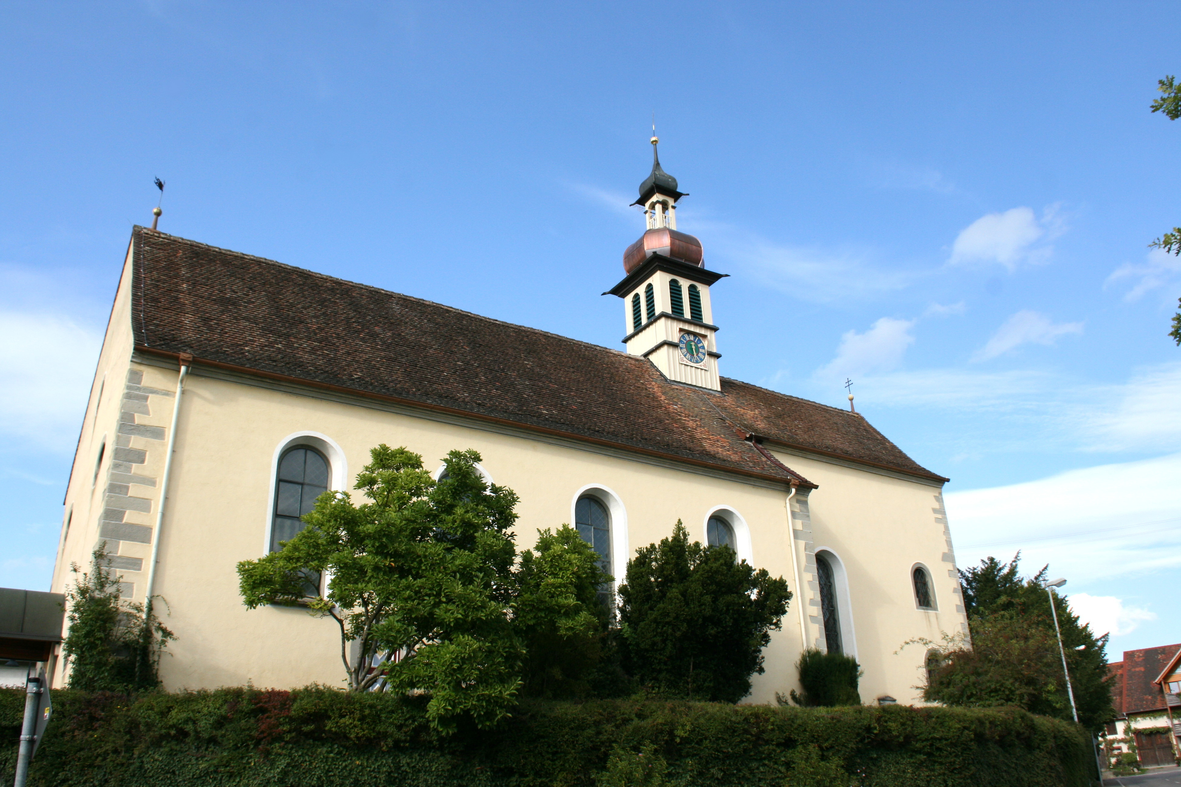 Sankt-Bartholomäus-Kirche, Brunnenstraße in Hödingen, Überlingen